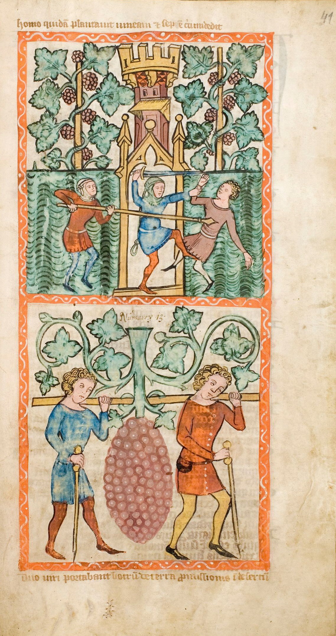 Speculum Humanae Salvationis, Westfalen oder Köln, um 1360. ULB Darmstadt, Hs 2505, fol. 41r